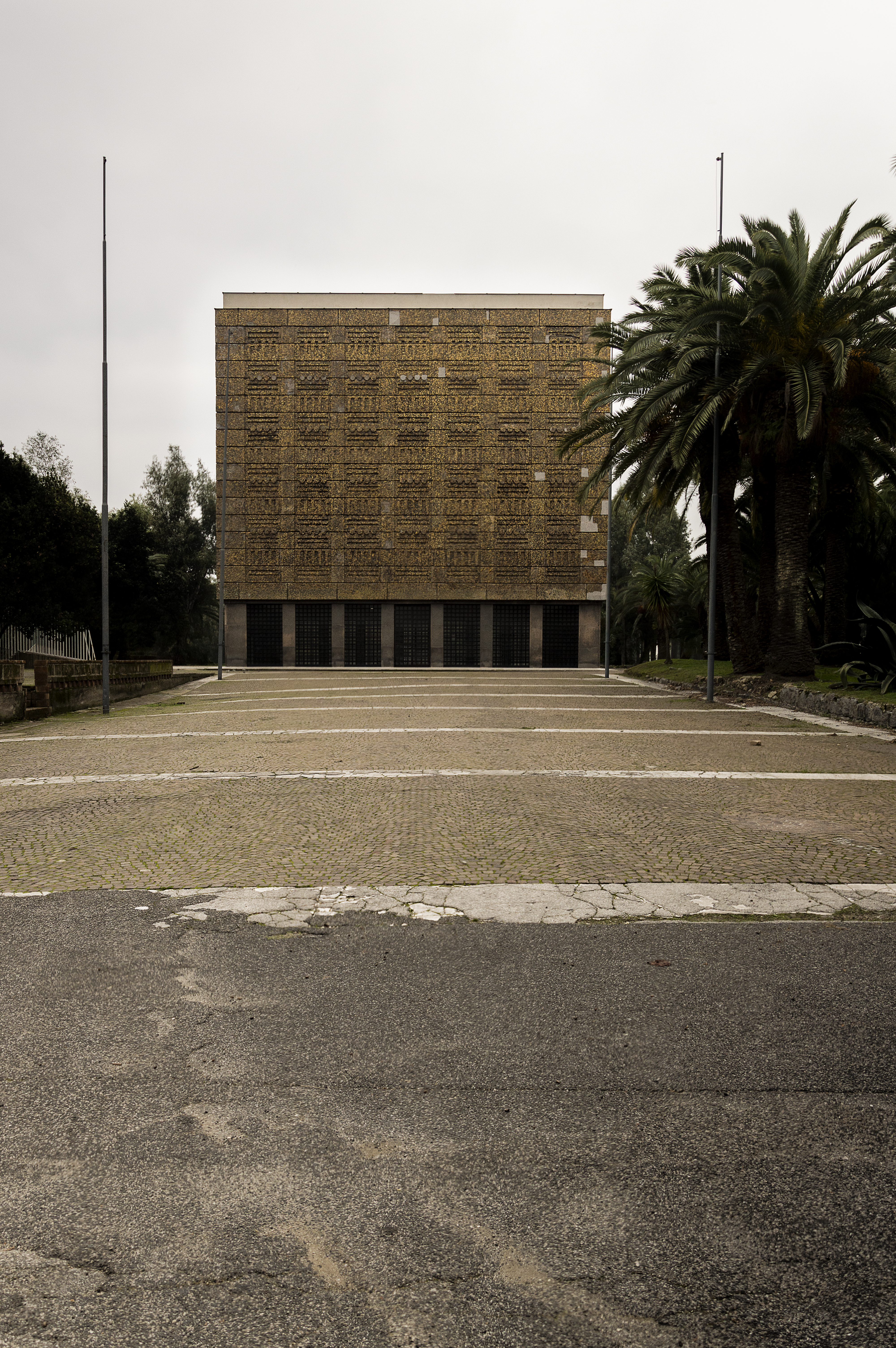 Prospetto prncipale del Cubo.